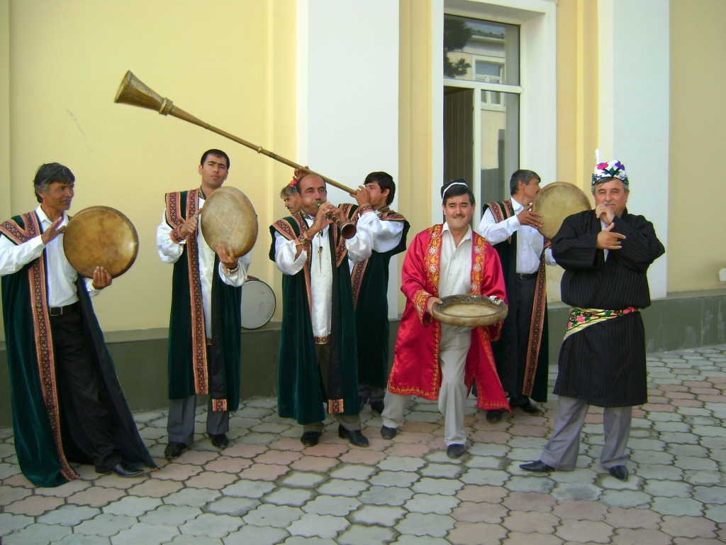 Свадебная церемония в Гиссарском районе Таджикистана,2015 год